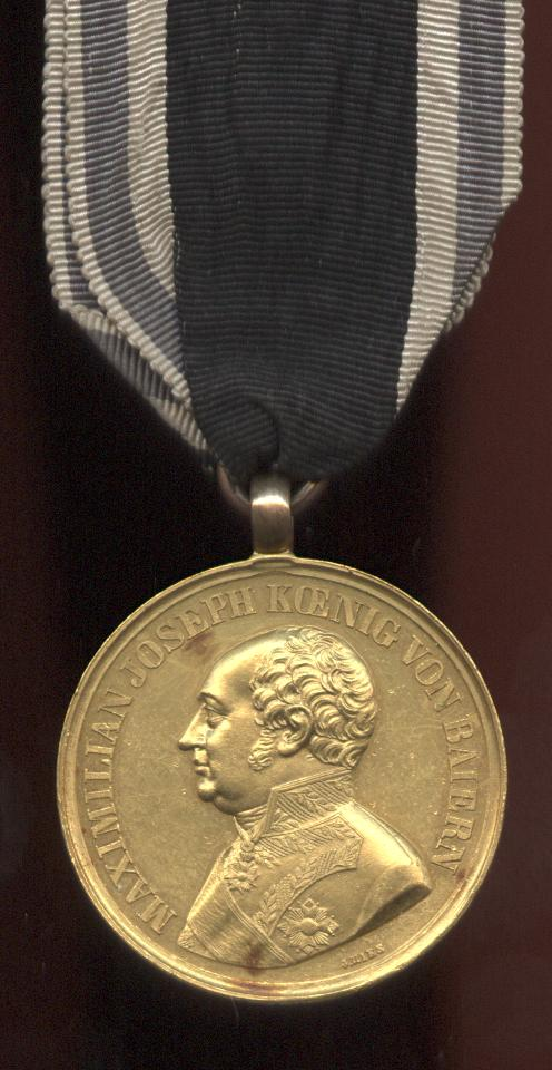 Bayerische Tapferkeitsmedaille Gold, Vorderseite